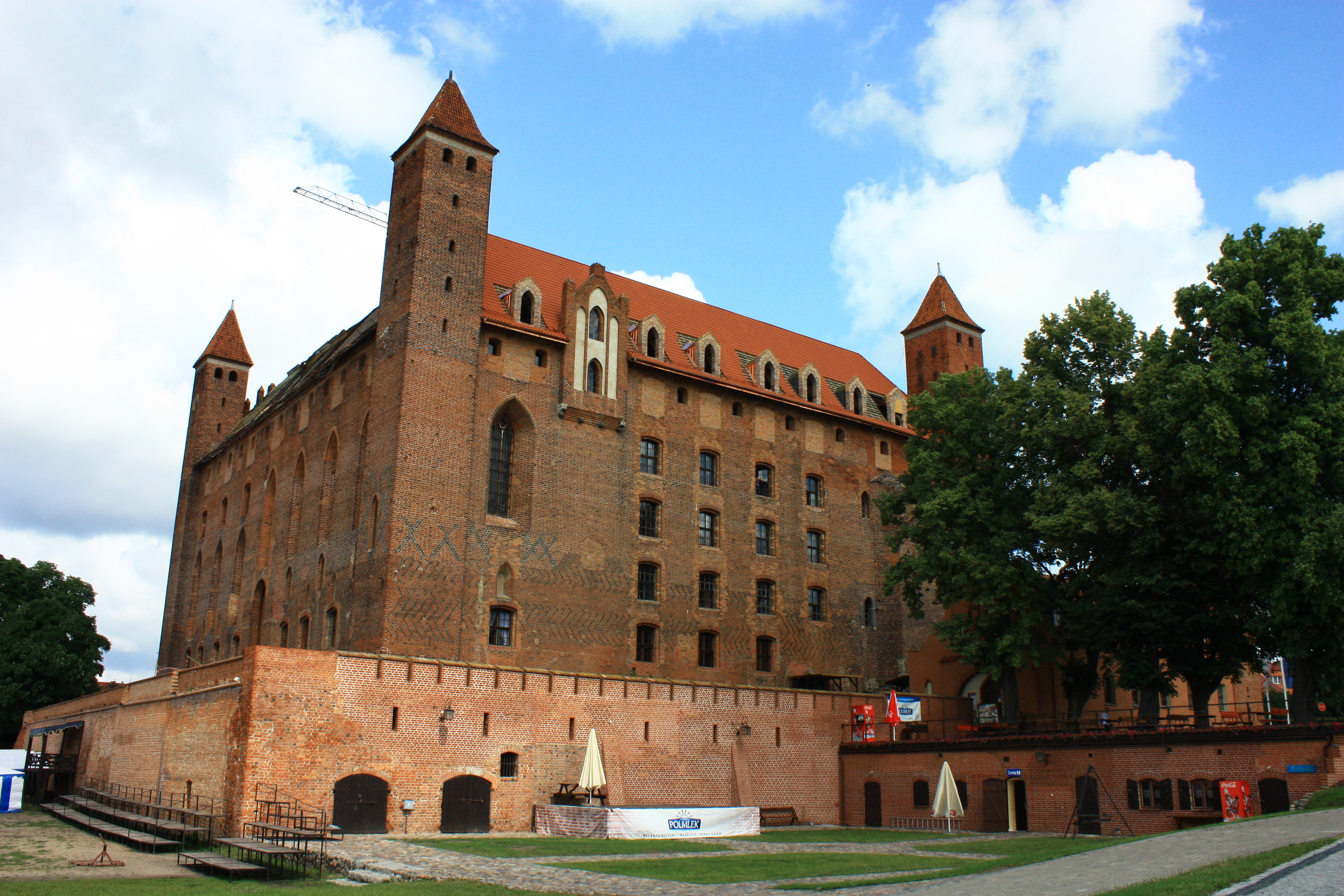 Gniew, zespół zamku krzyżackiego